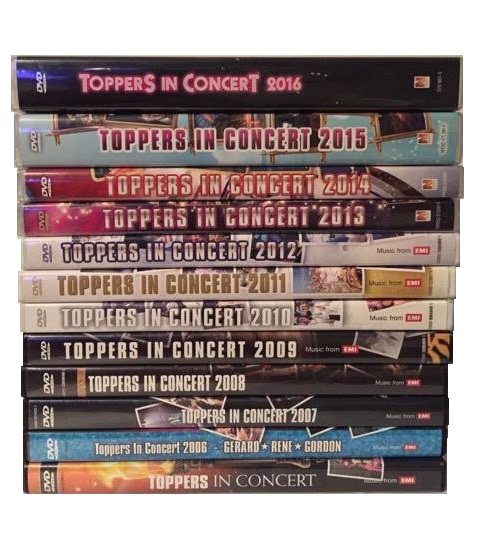 Toppers in Concert DVDs